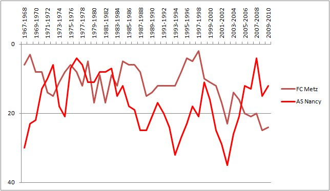 bilan saison par saison du FC Metz superposé à celui de l'AS Nancy de 1947 à 2010